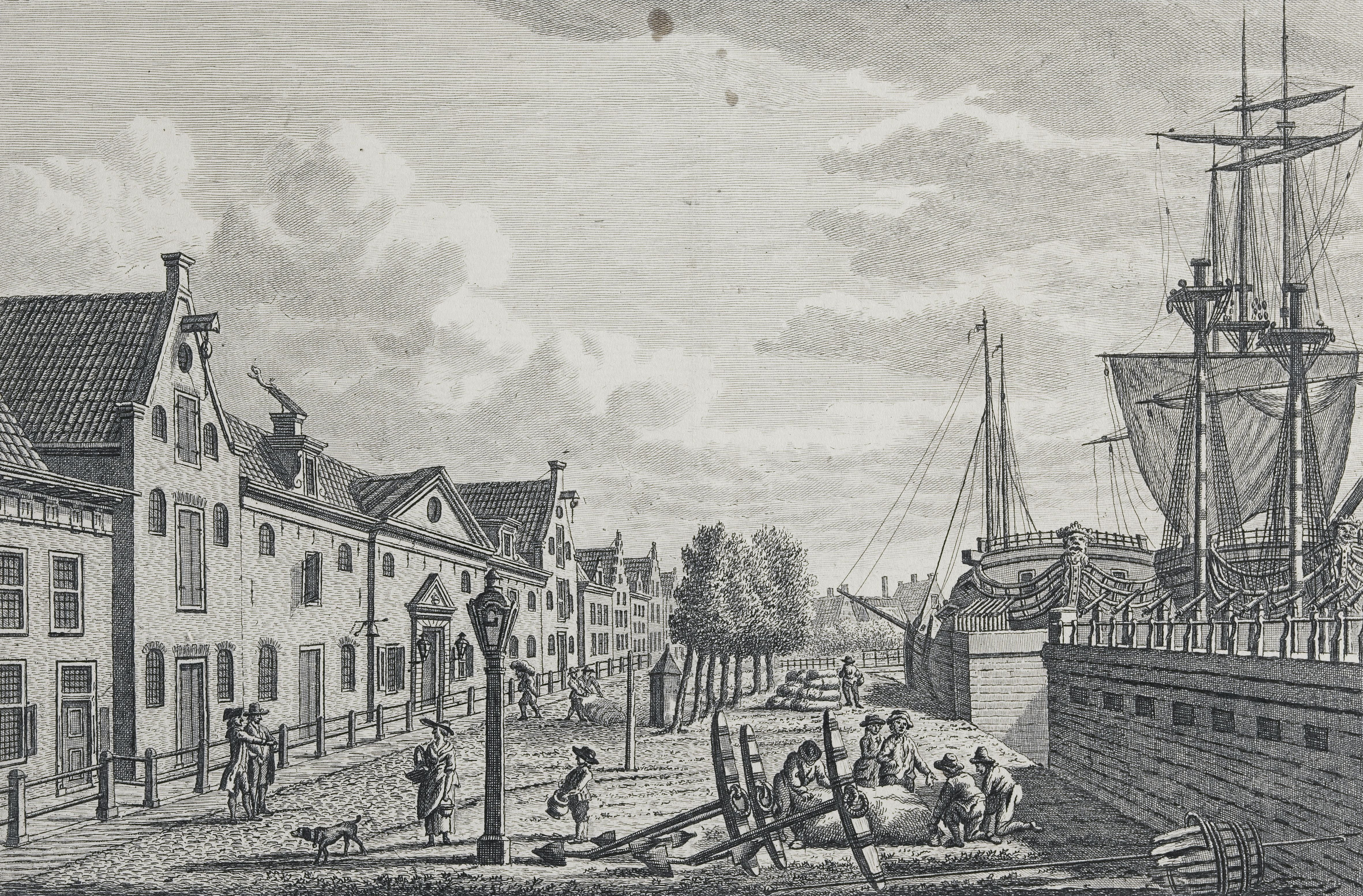 De admiraliteit yn Harns